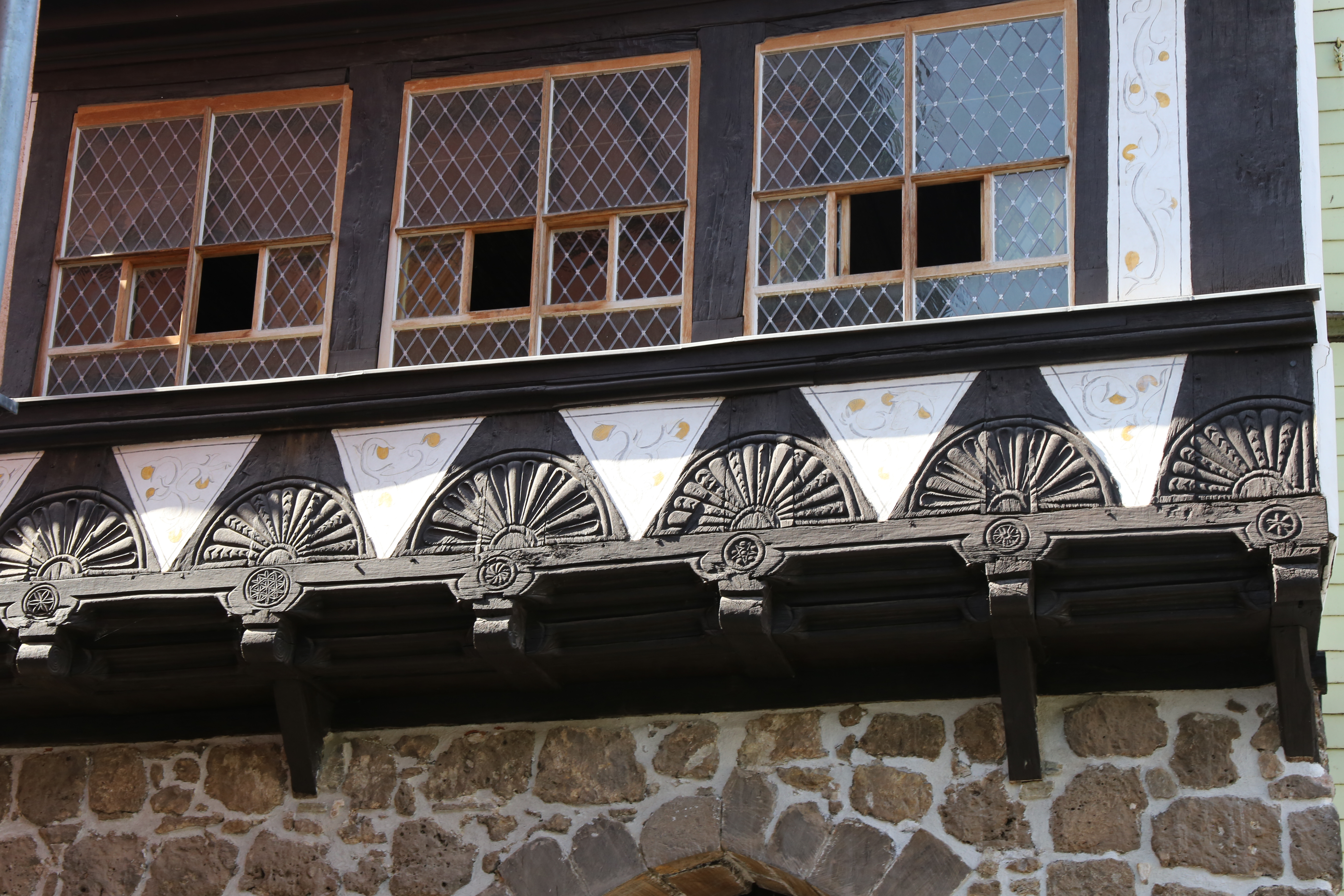 Domstraße 12 in Nordhausen